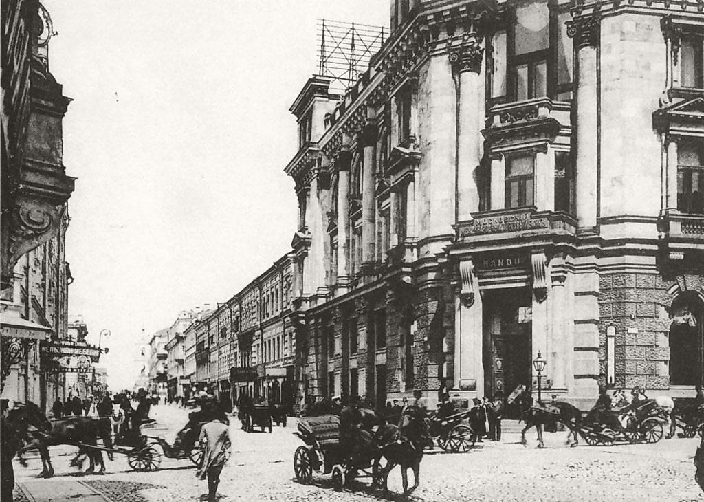 Дом Фирсанова на Рождественке